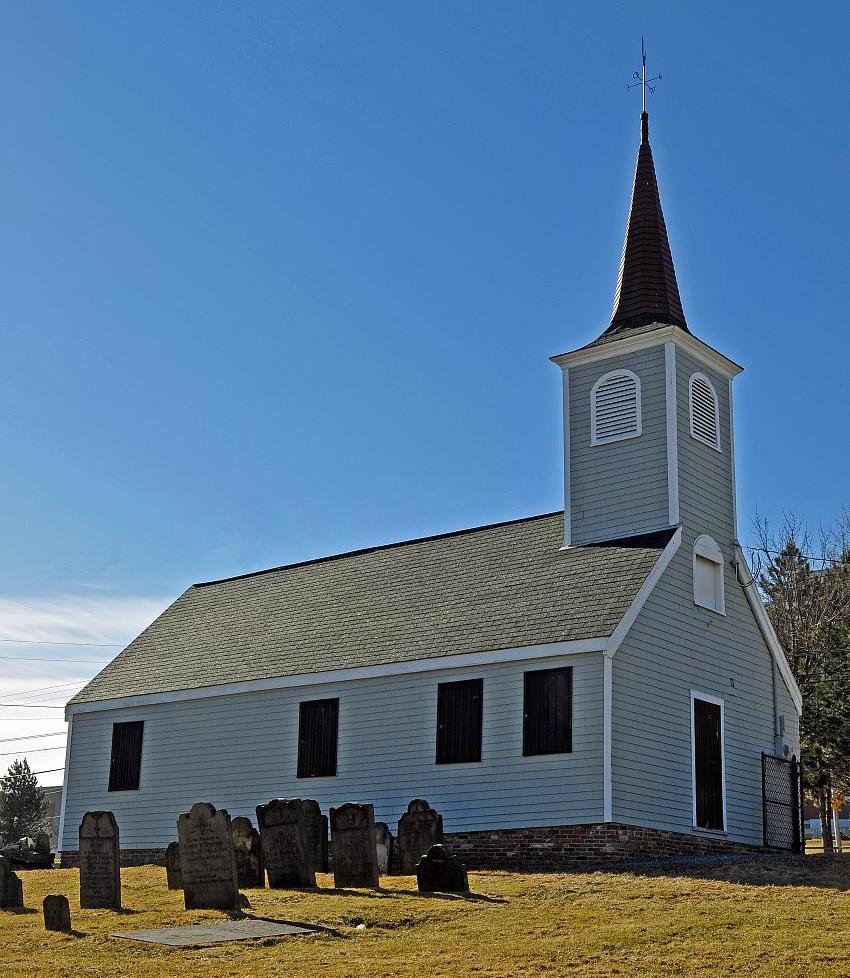 L'Église «Little Ducth» à Halifax, désignée lieu historique national du Canada en 1996